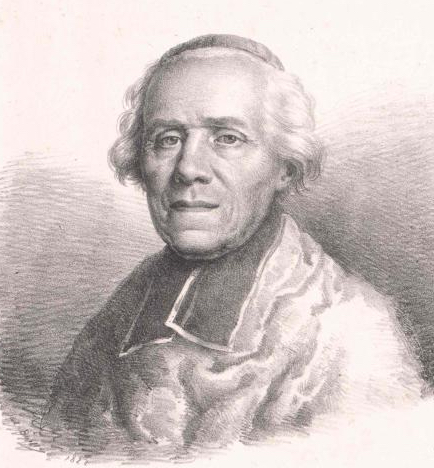 Portrait du cardinal Louis-François de Bausset